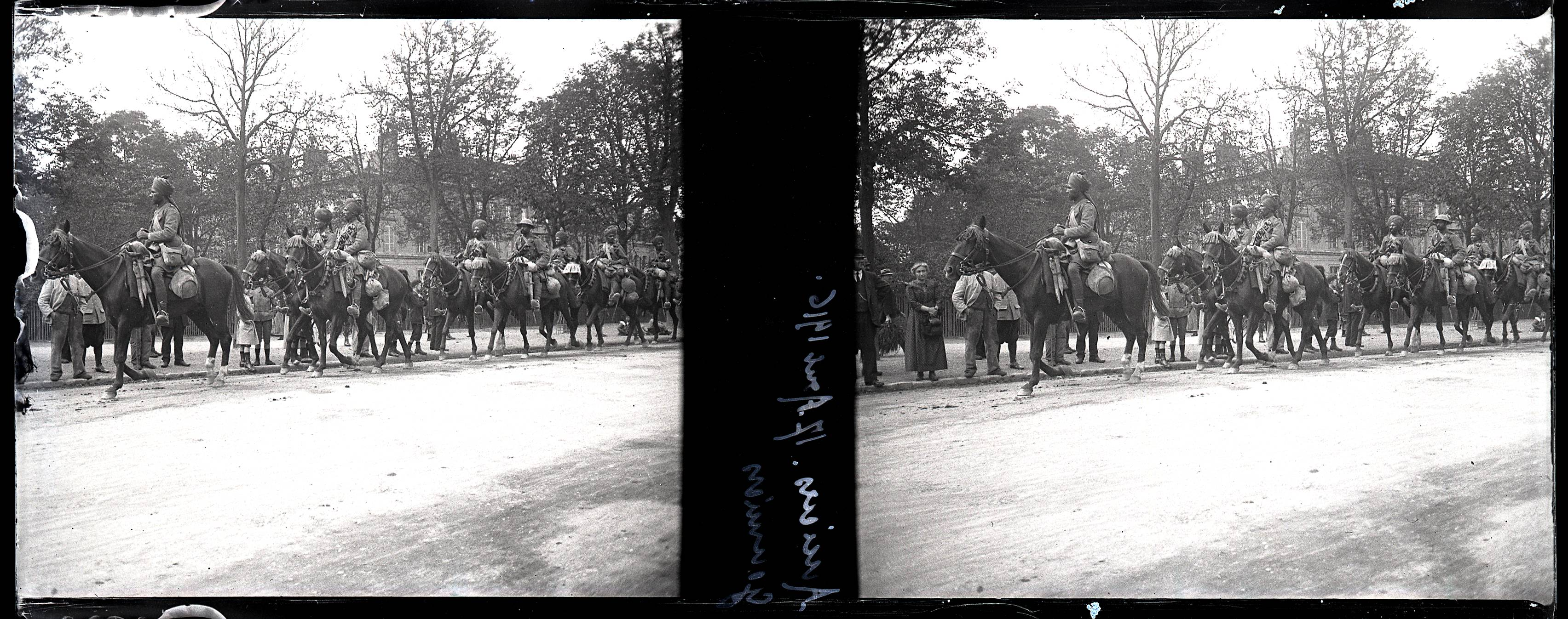 The factual accuracy of this description or the file name is disputed.Reason: Ces soldats sont plutôt des Indiens, en tous cas des soldats de l'Empire britannique (voir le casque porté par un des cavaliers). Vue d'ensemble d'un défilé de goumiers (militaires maghrébins) à cheval à Amiens (Somme). 1er avril 1916. Guerre 1914-1918.